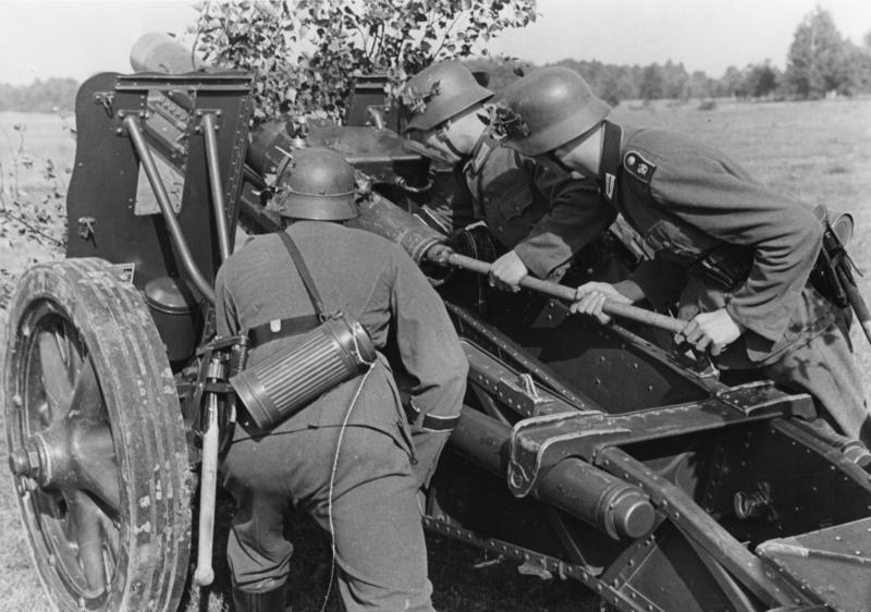 Gewandtheit und Zupacken lernt der Kanonier in harten Ausbildungswochen.